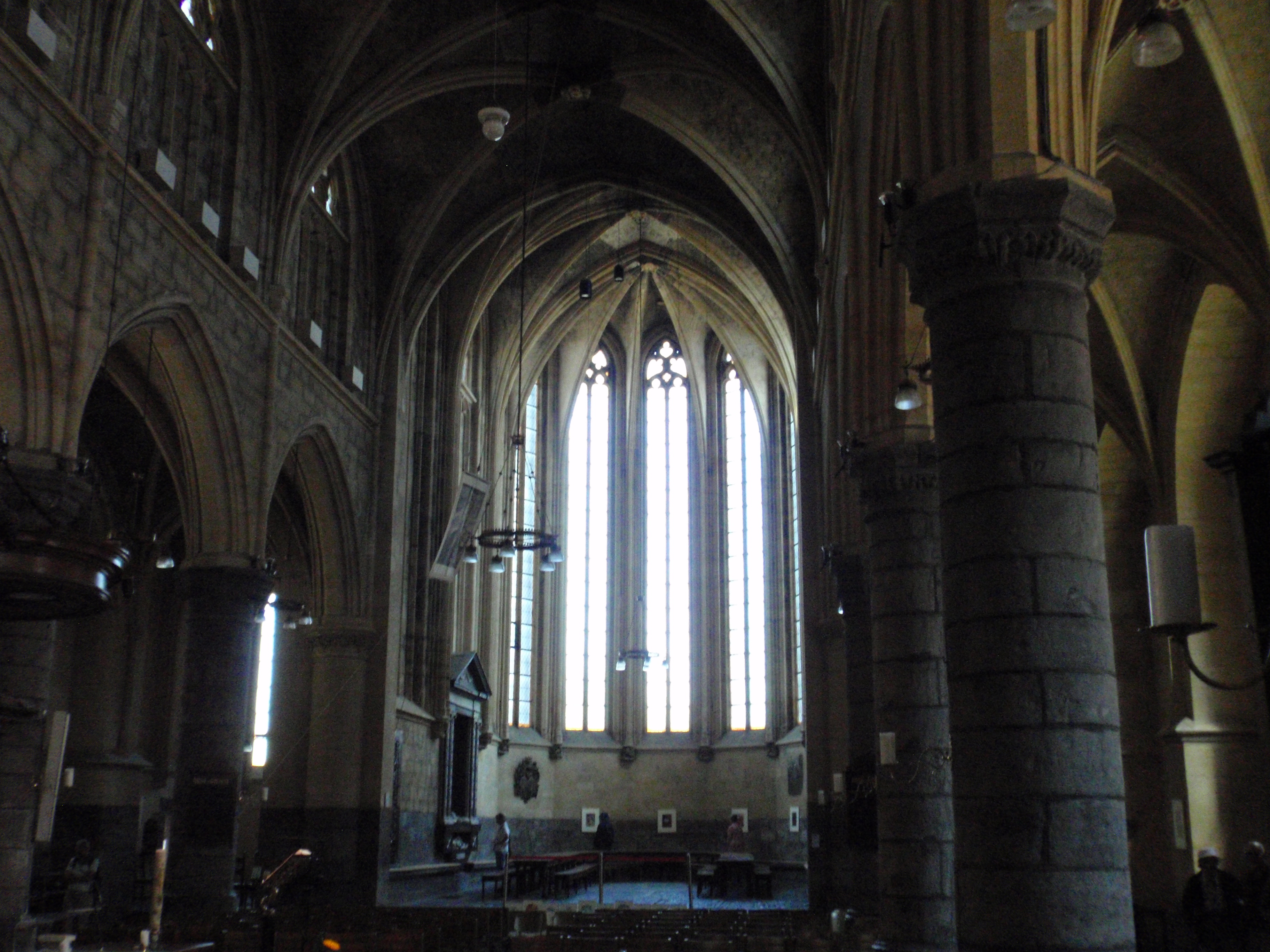 interieur Sint Jan te Maastricht